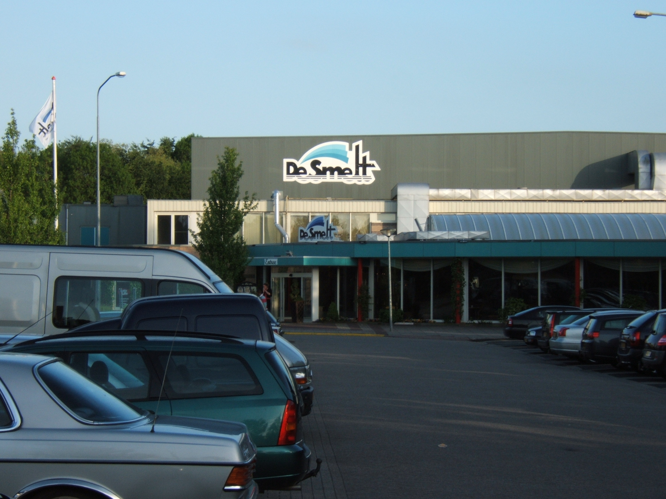 Ingang de smeltDe Bonte Wever. - Stadsbroek 17, 9405 BK Assen, Hollandia eigen werk